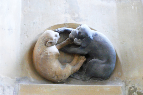 Vnitřní výzdoba katedrály